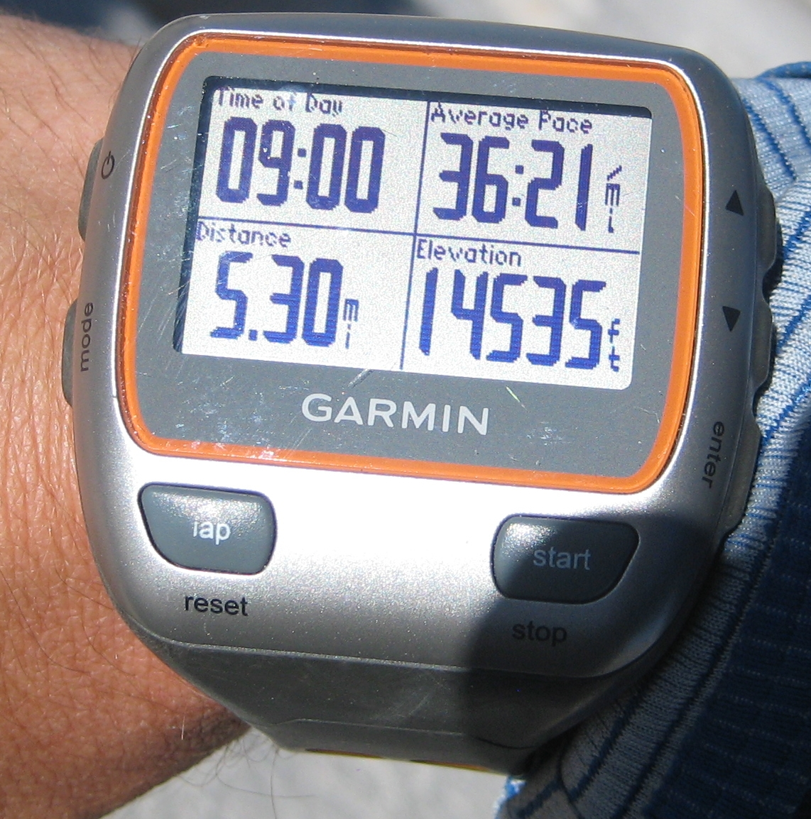 Garmin Forerunner 310 XT